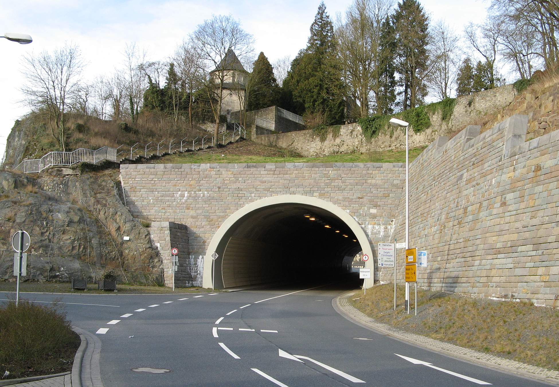 Mühlbergtunnel im Zuge der Teilortsumgehung Weilburg (132 m). Hier Portal von der Taunusseite